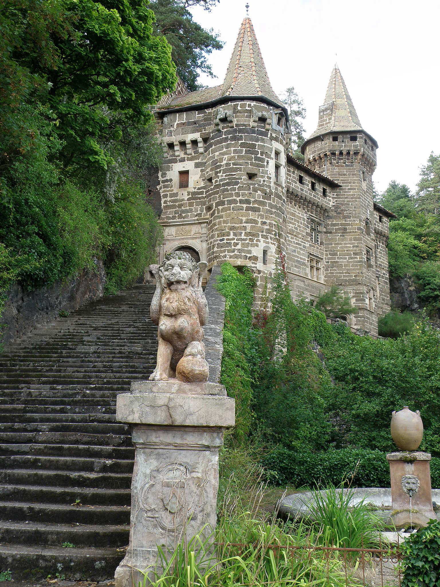 Saint-Paulien, dép. de la Haute-Loire, France (Auvergne). Château de La Rochelambert.